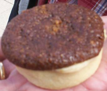 Liers Vlaaike. Eigen werk.